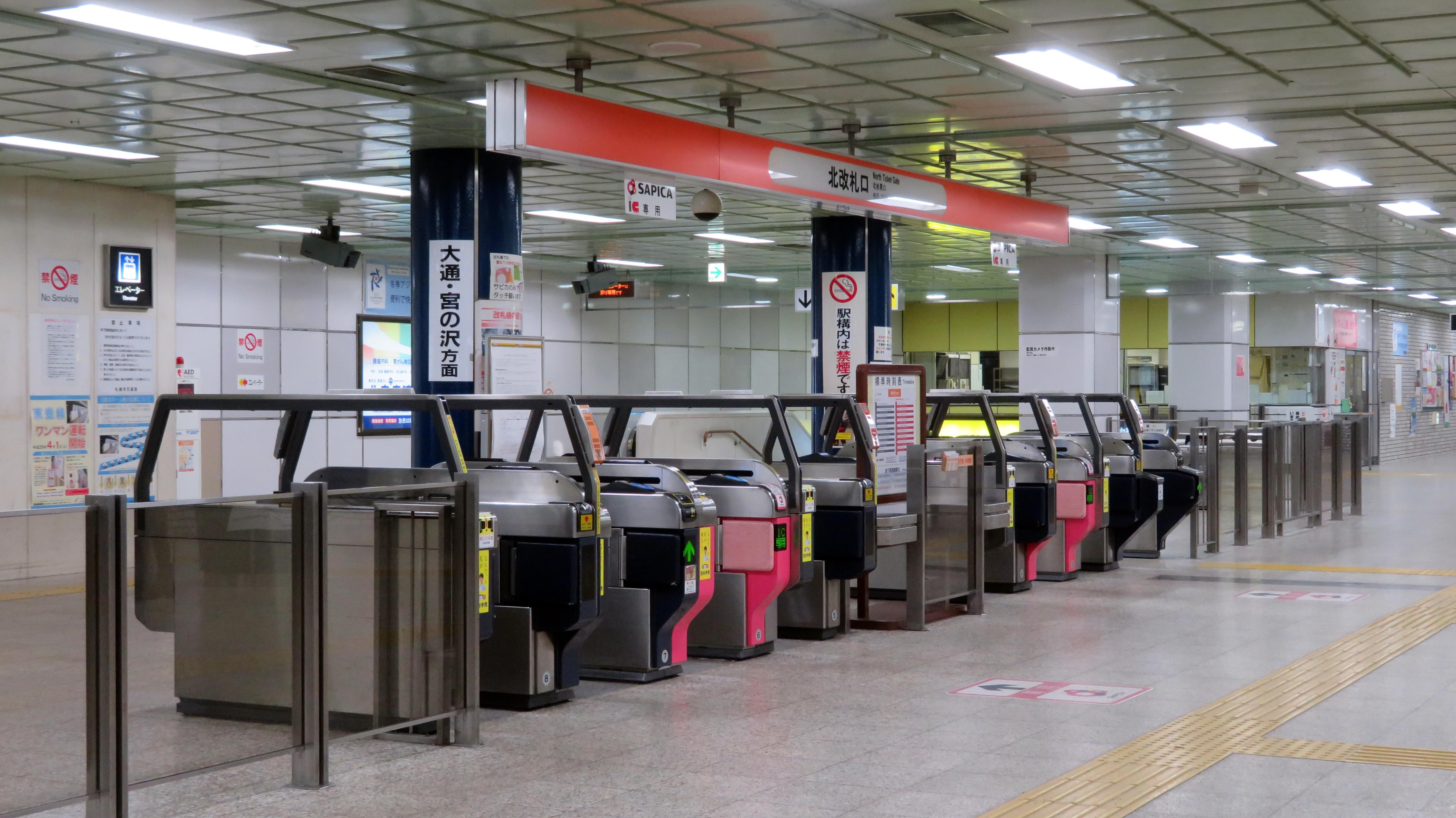 新さっぽろ駅北改札口 Canon PowerShot SX720 HS